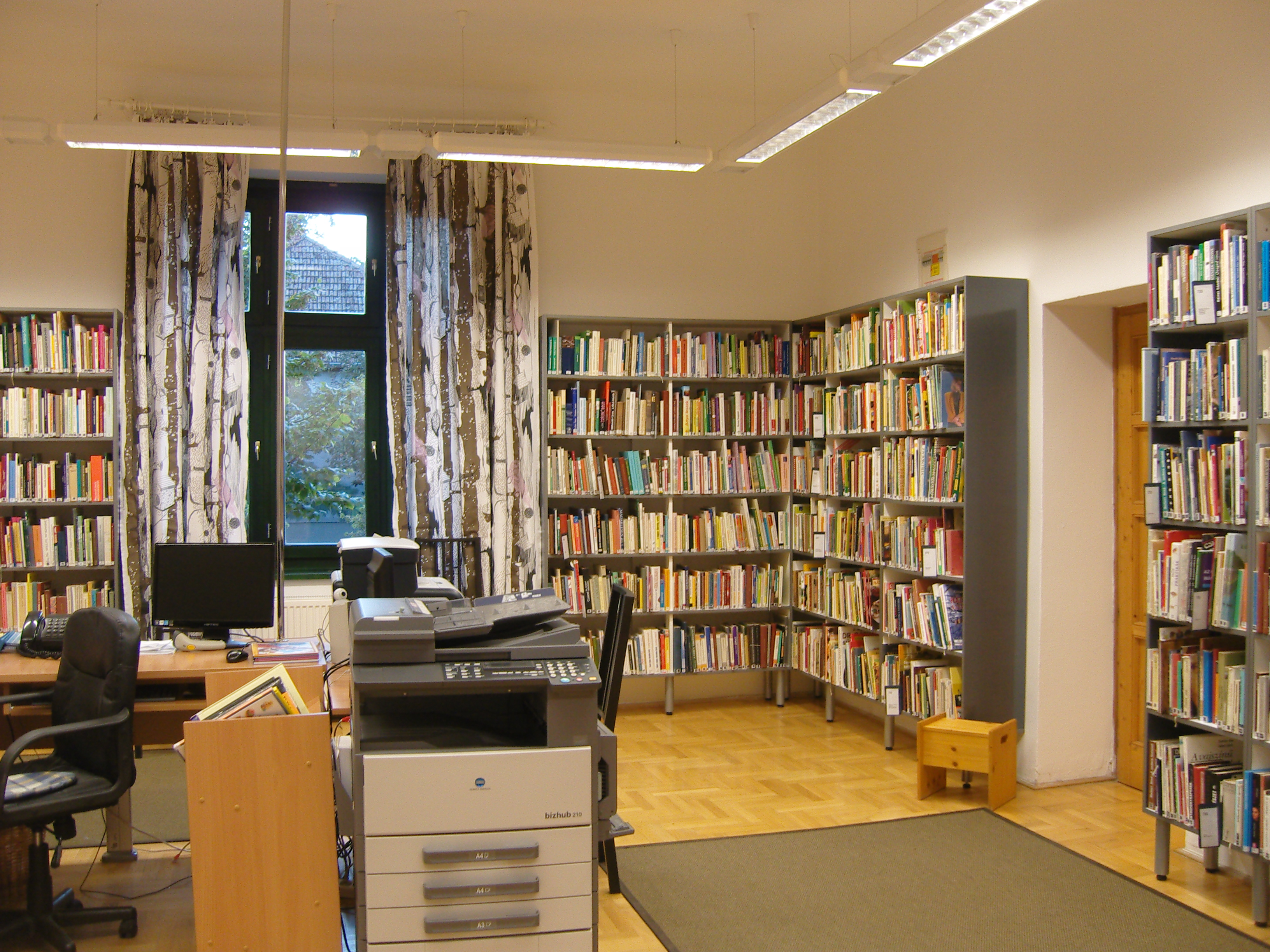 Az algyői könyvtár olvasótere